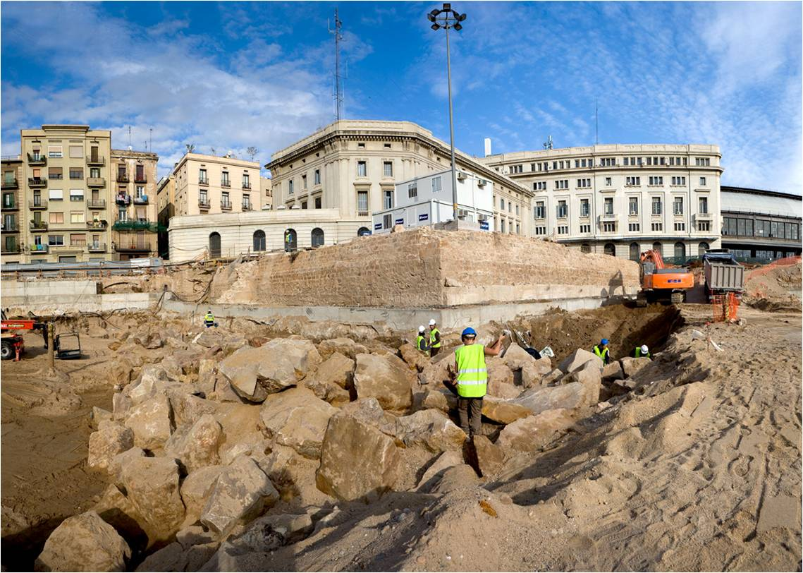 Baluard del Migdia (S.XVI) que cobria el Portal de Mar. Excavació realitzada l'any 2006.